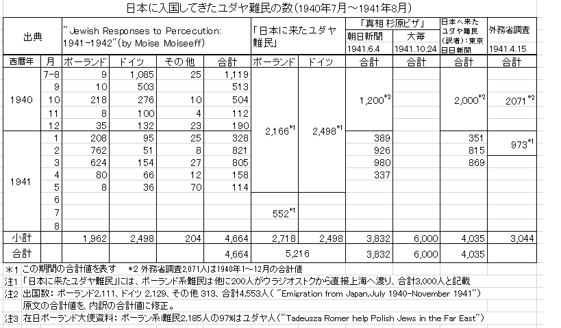 文献によるユダヤ難民の入国者数